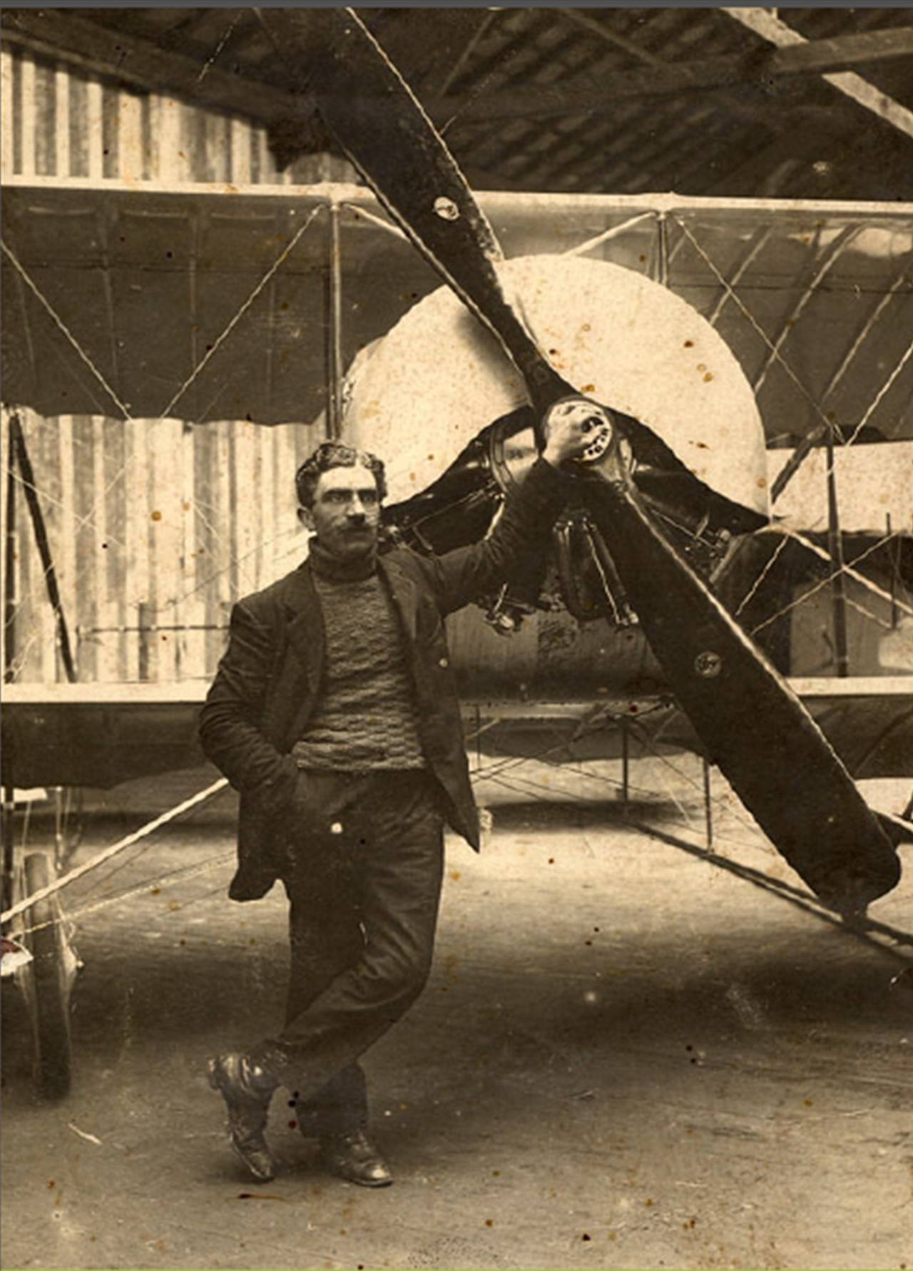 Cesare Cervetti nello stabilimento AER di Orbassano con un aereo Caudron G 3